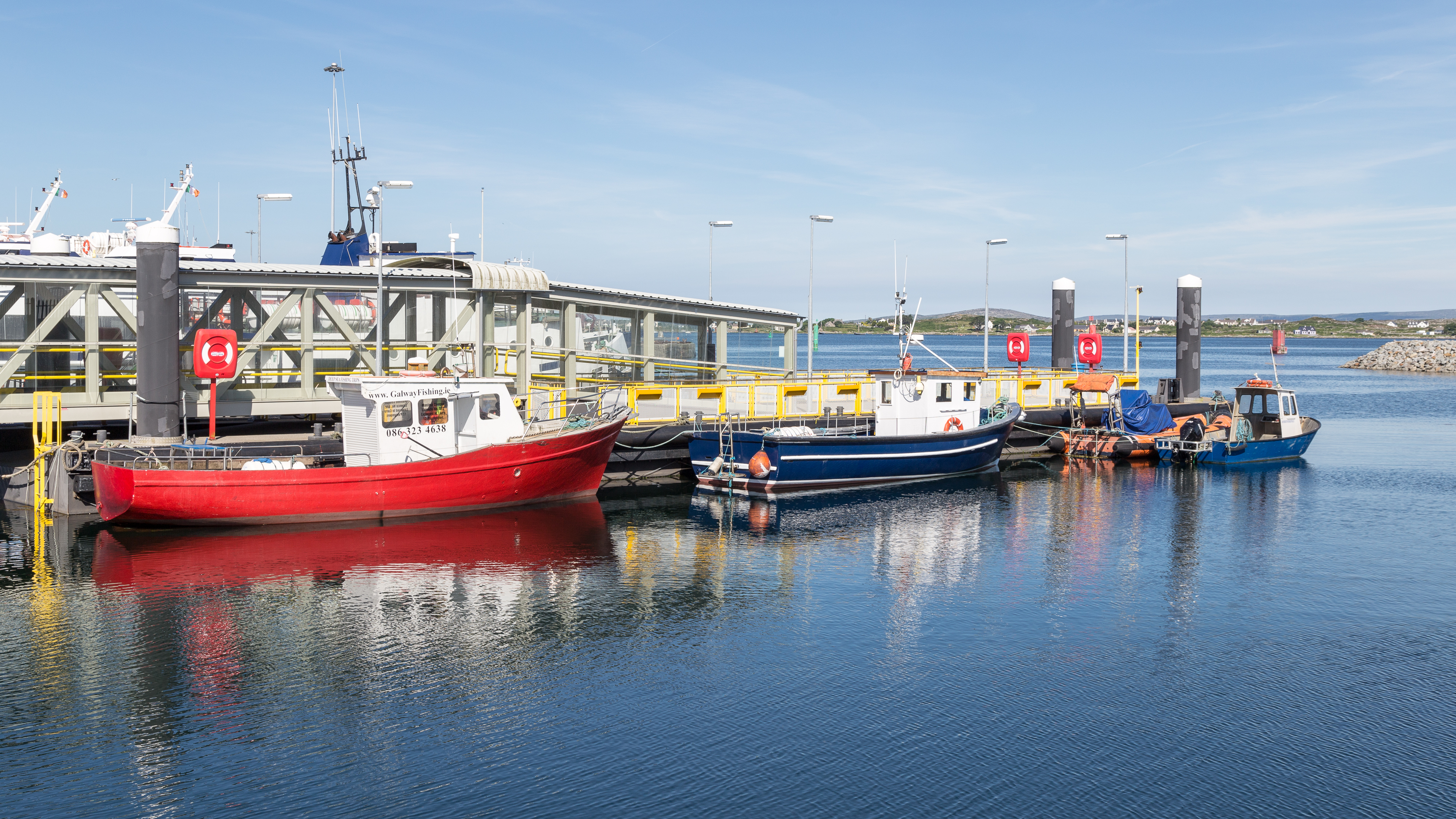 Boats in Ros an Mhil/Rossaveel, Co. Galway (2014)